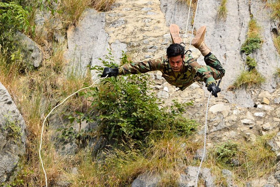 Первая совместная тренировка по горной подготовке в рамках российско-пакистанского тактического учения «Дружба-2016»